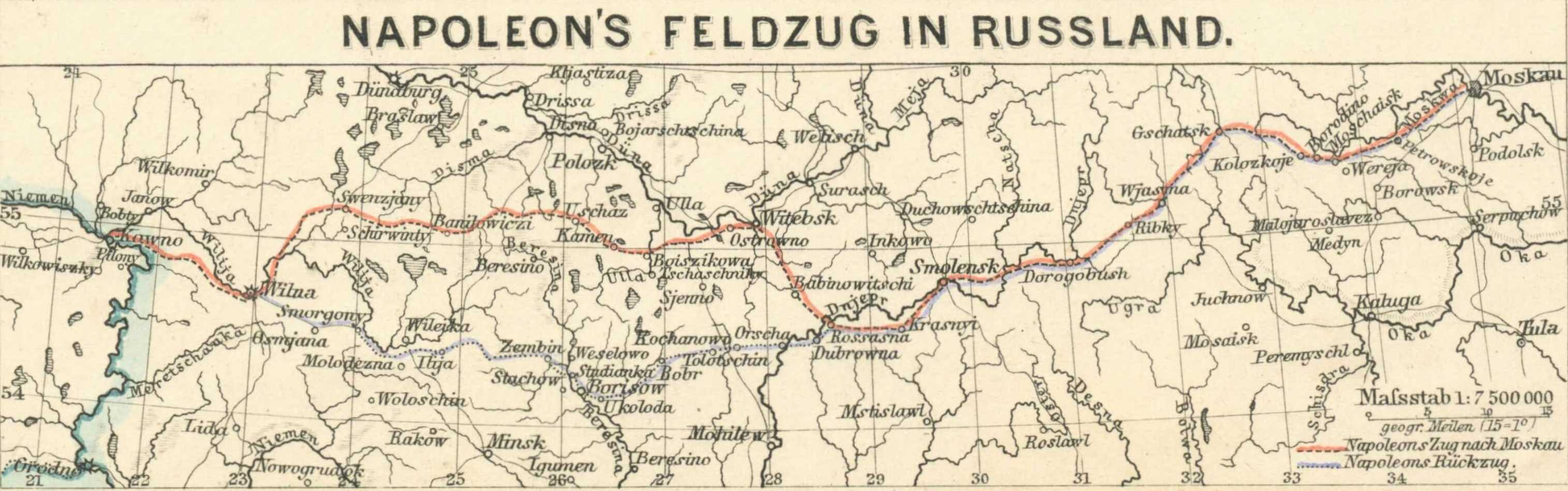 Napoleon’s Feldzug in Russland